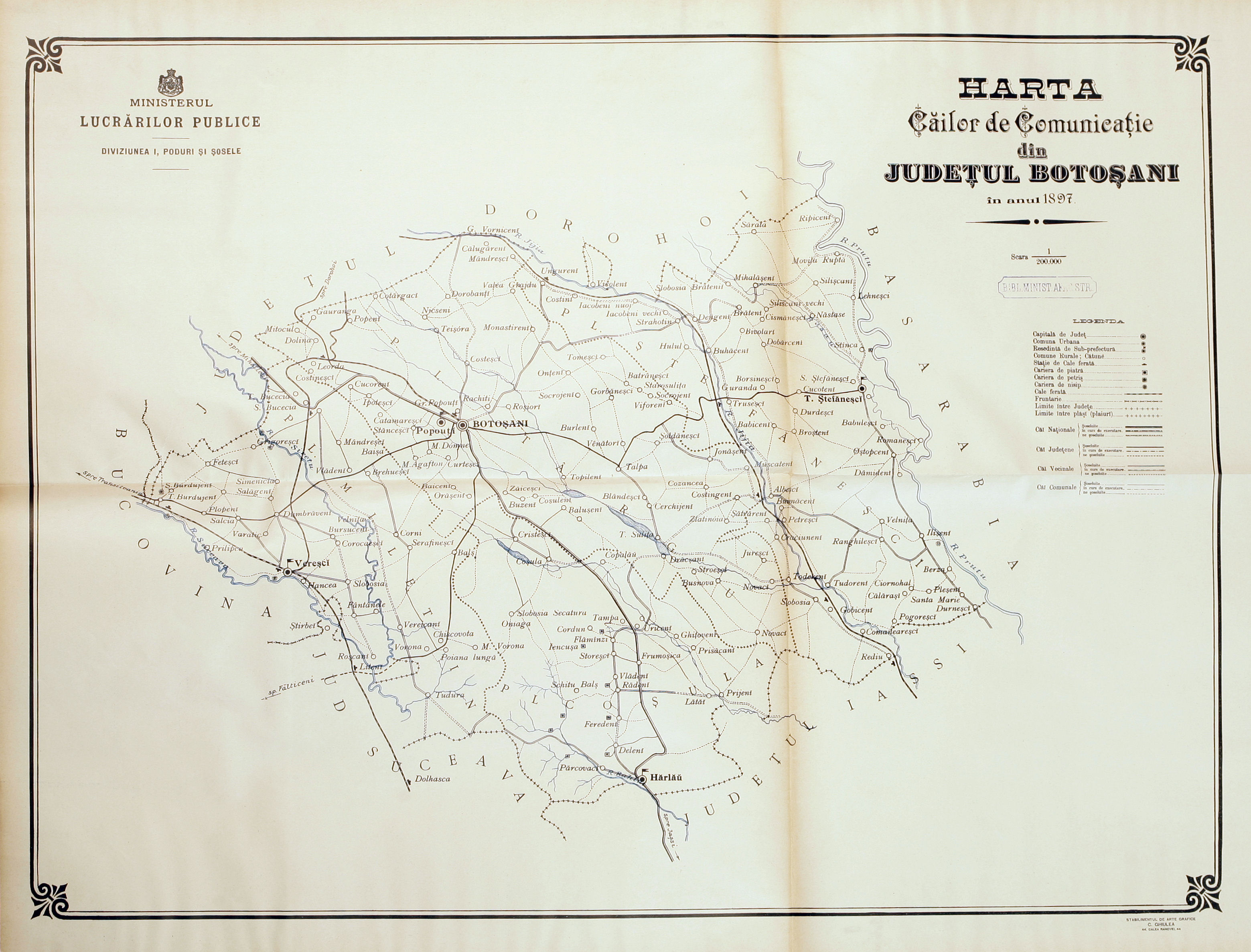 Atlasul Căilor de Comunicații (1897) - județul Botoșani